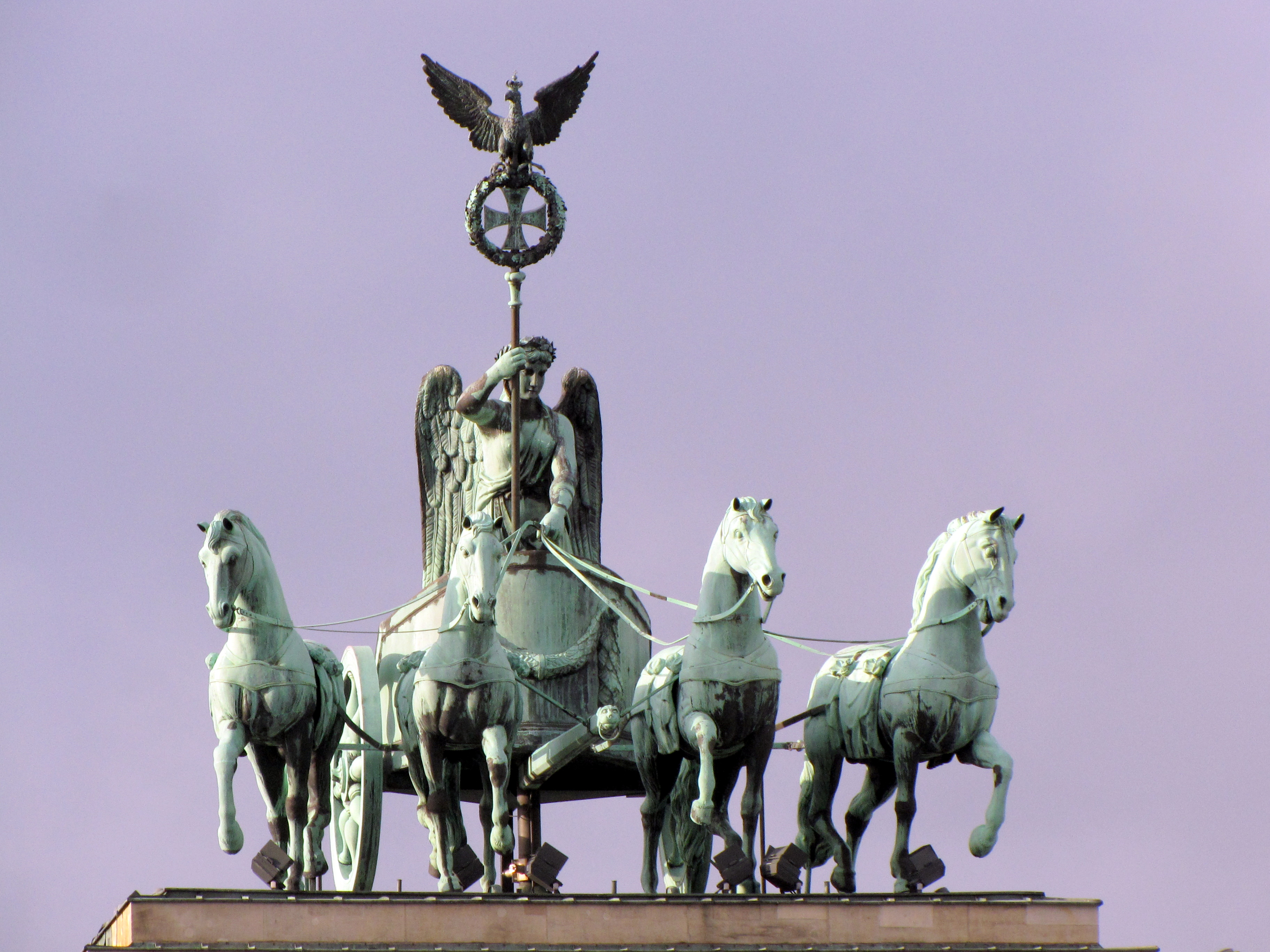 Берлин